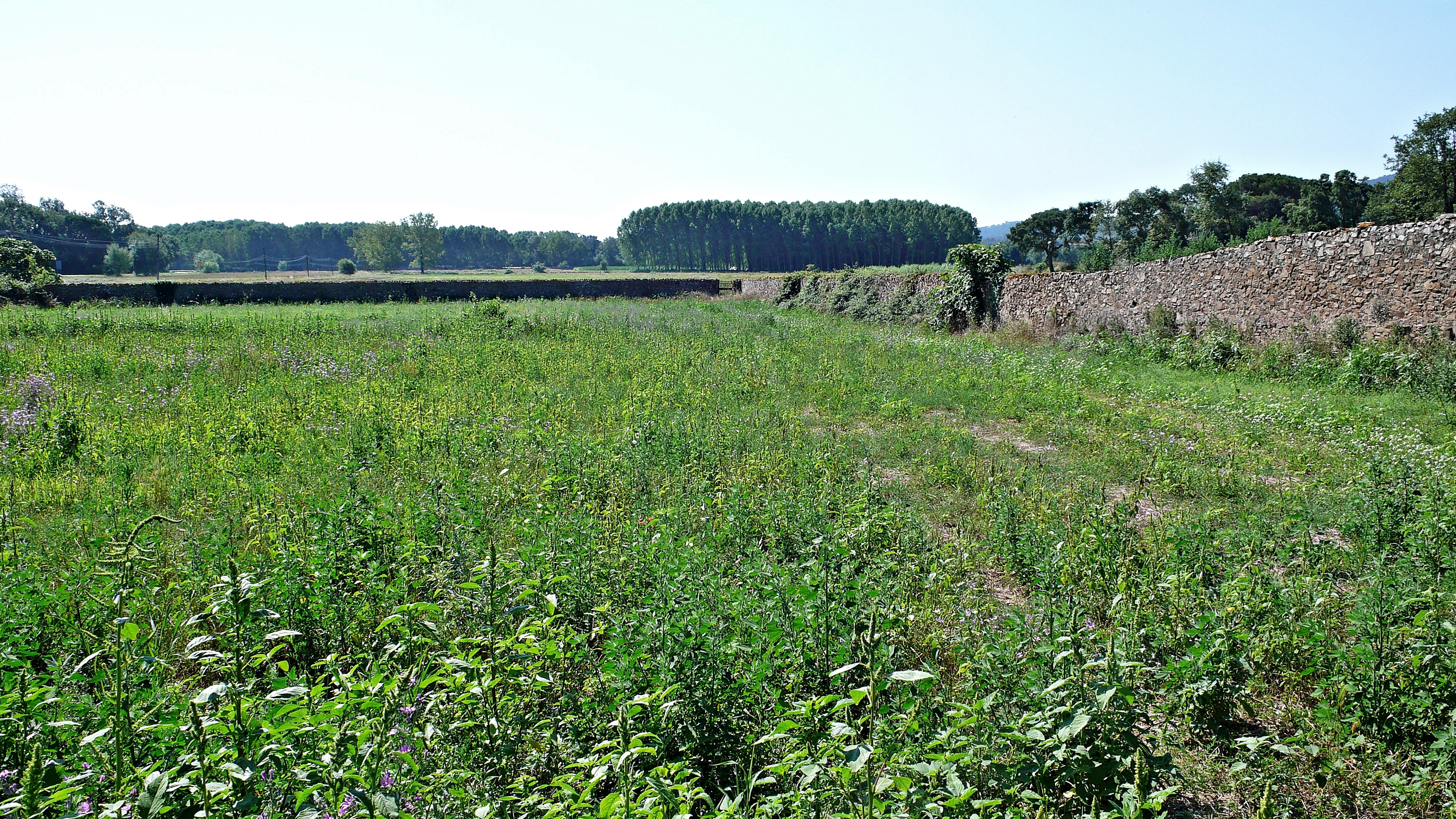 Prado de can Puig-tordera 2014